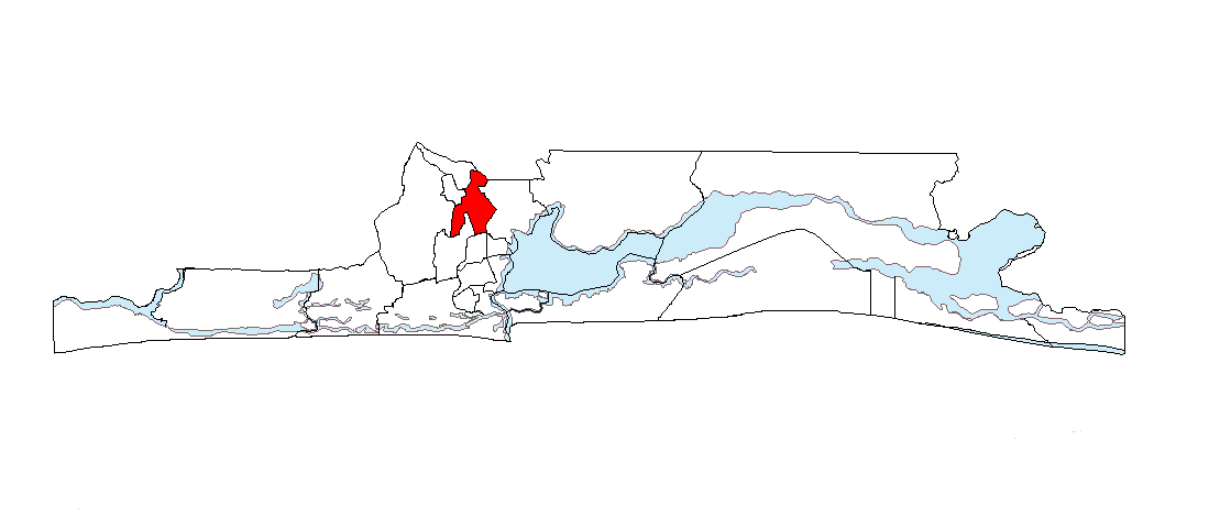 Ubicación de Ikeja en el Estado de Lagos